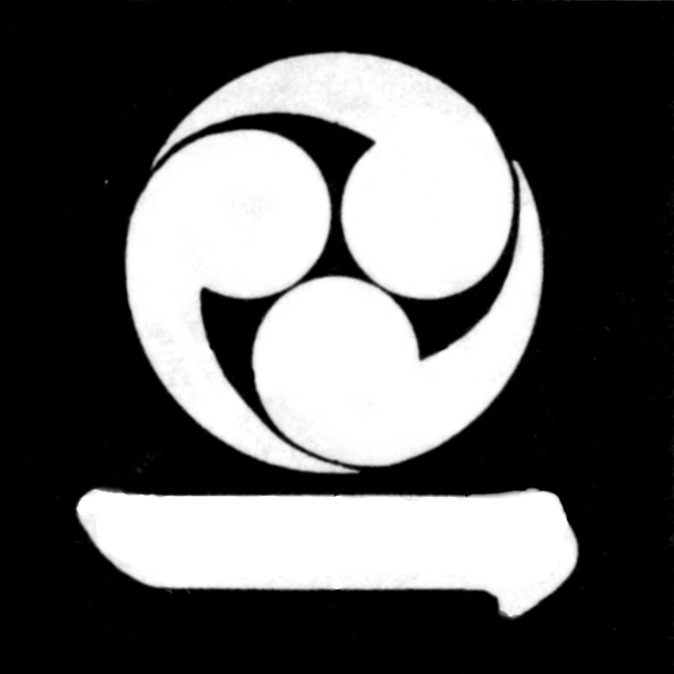 三つ巴に一文字